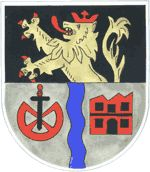 Wappen von Hoppstädten-Weiersbach